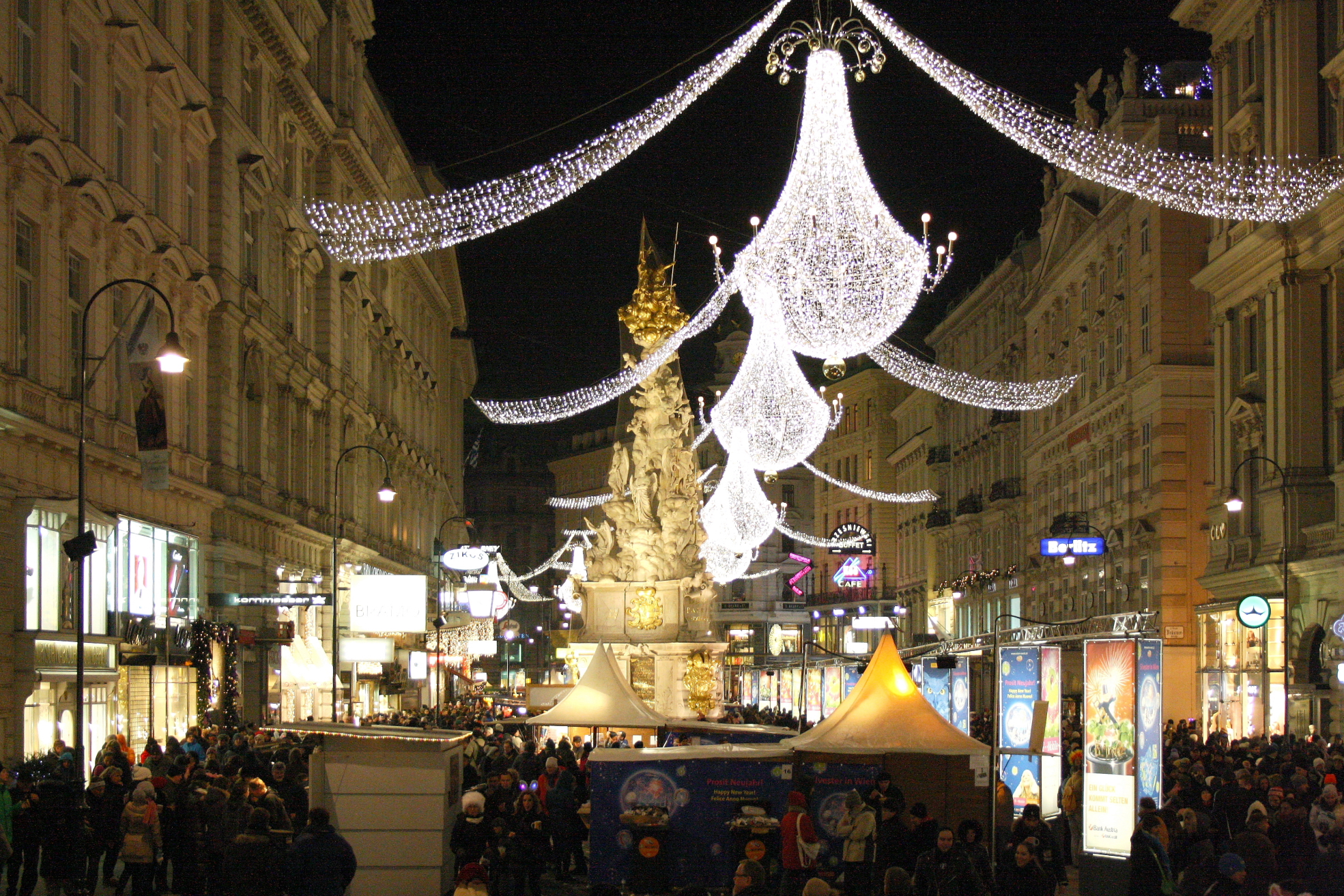 Der Wiener Silvesterpfad 2010/11 im Bereich des Graben.